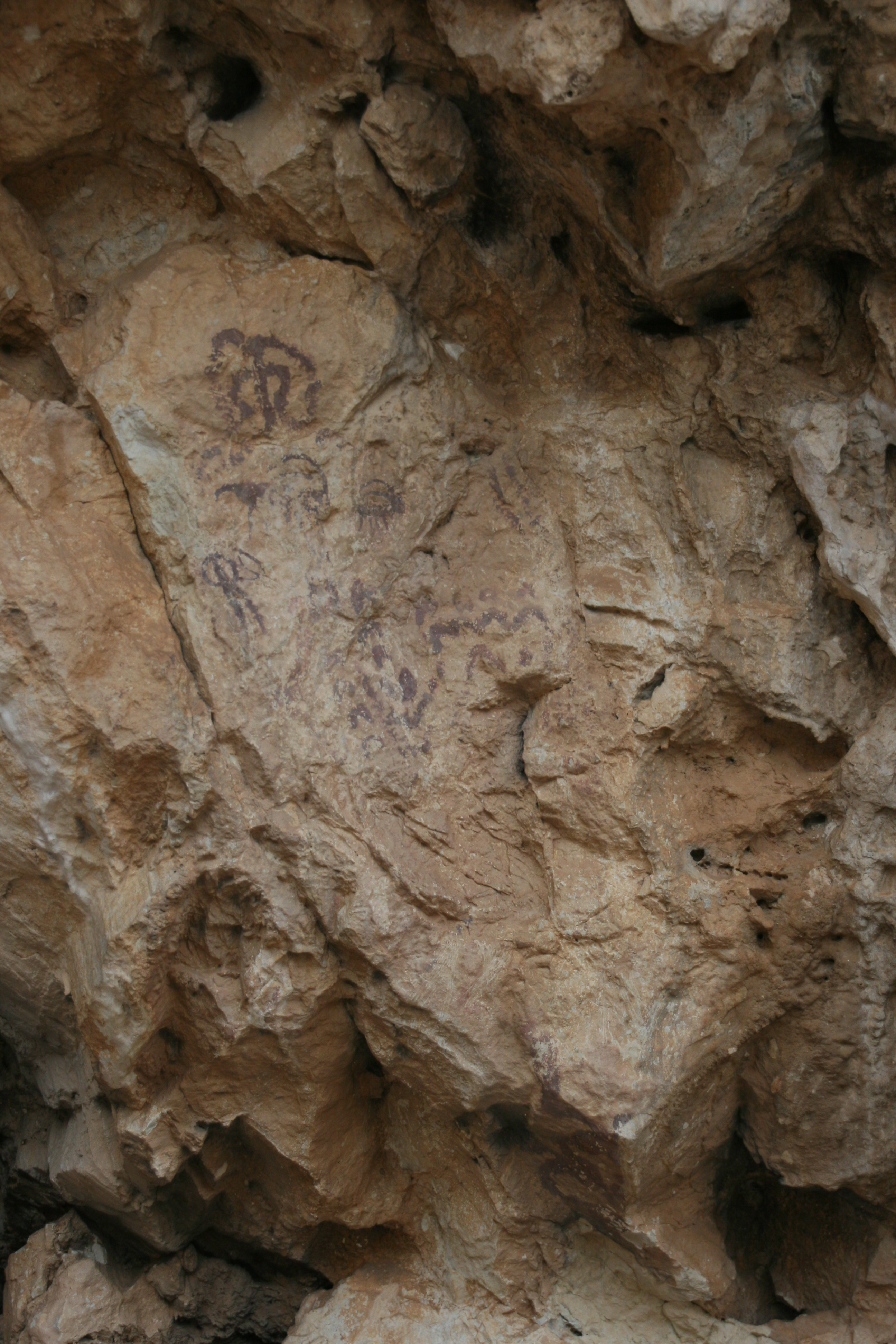 Abrigo conocido como Cueva de Los Letreros, en Vélez-Blanco (Almería, España) .